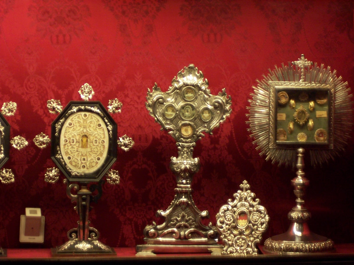 Relicarios de los siglos XVII, XVIII y XIX en la capilla de las Doncellas de la catedral de Sevilla, (España).